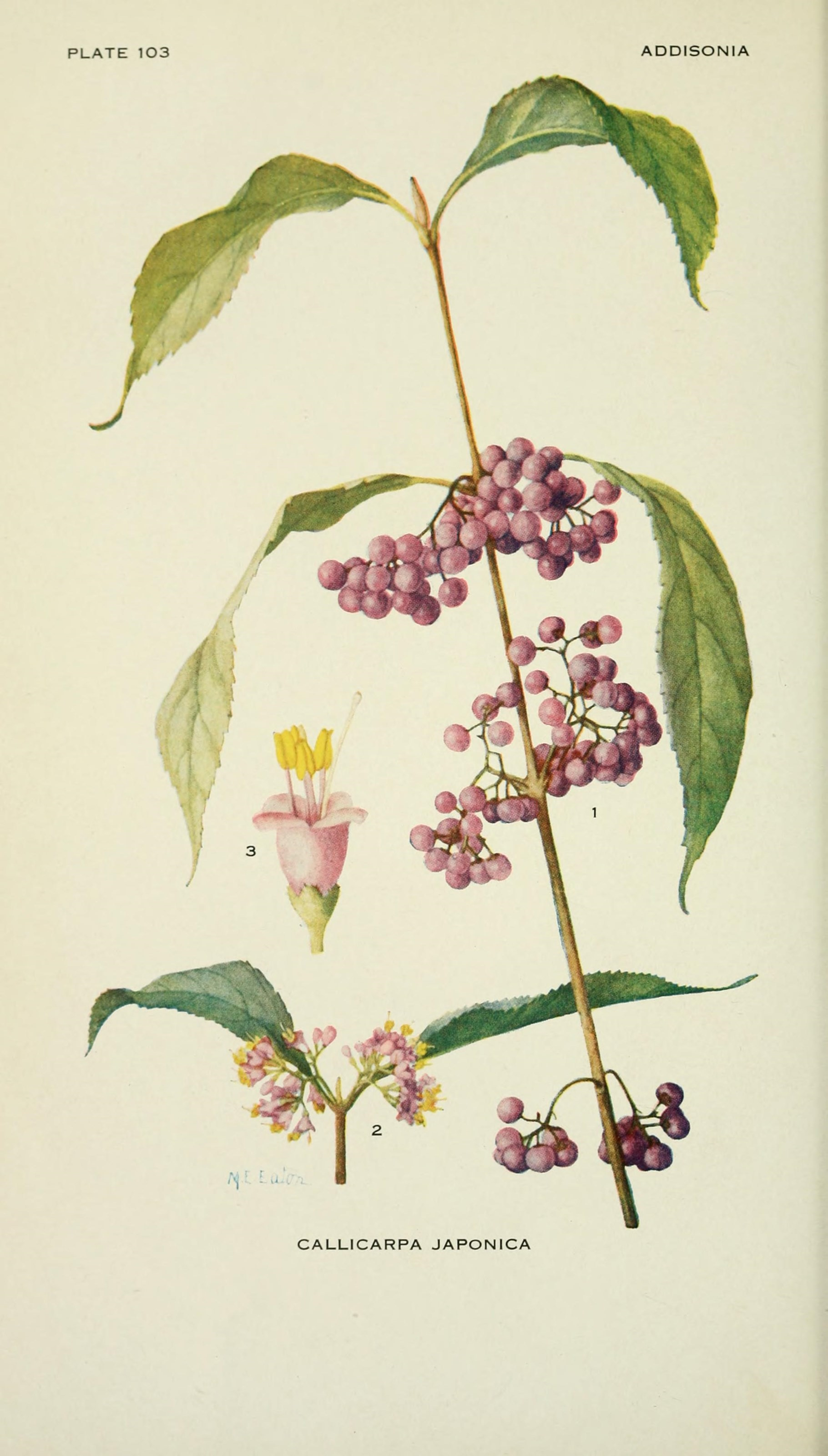 PLATE 103 ADDISONIA CALLICARPA JAPONICA